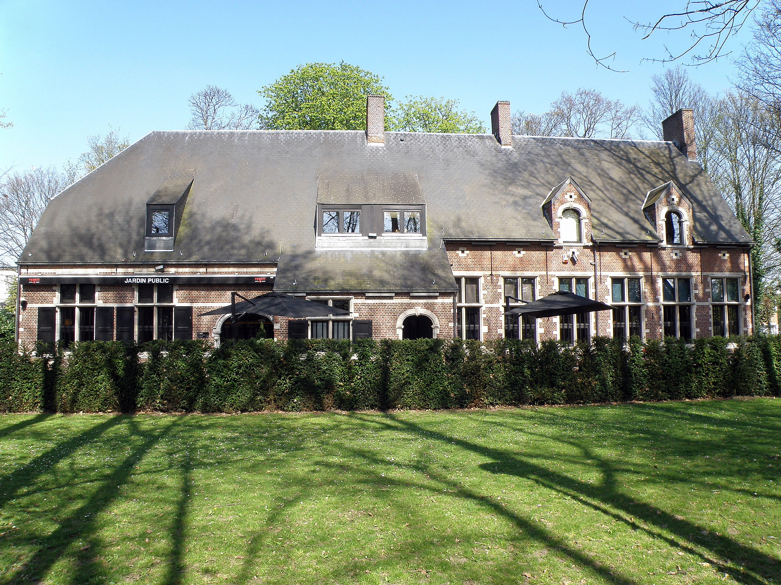 Antwerpen, district Berchem. Hof van Nauwelaerts, gelegen Lodewijk Van Berckenlaan 146. Hoeve in neotraditionele stijl, gebouwd 1910-11 n.o.v. Emiel Van Averbeke. Voorgevel (zuidgevel) aan de L. Van Berckenlaan.